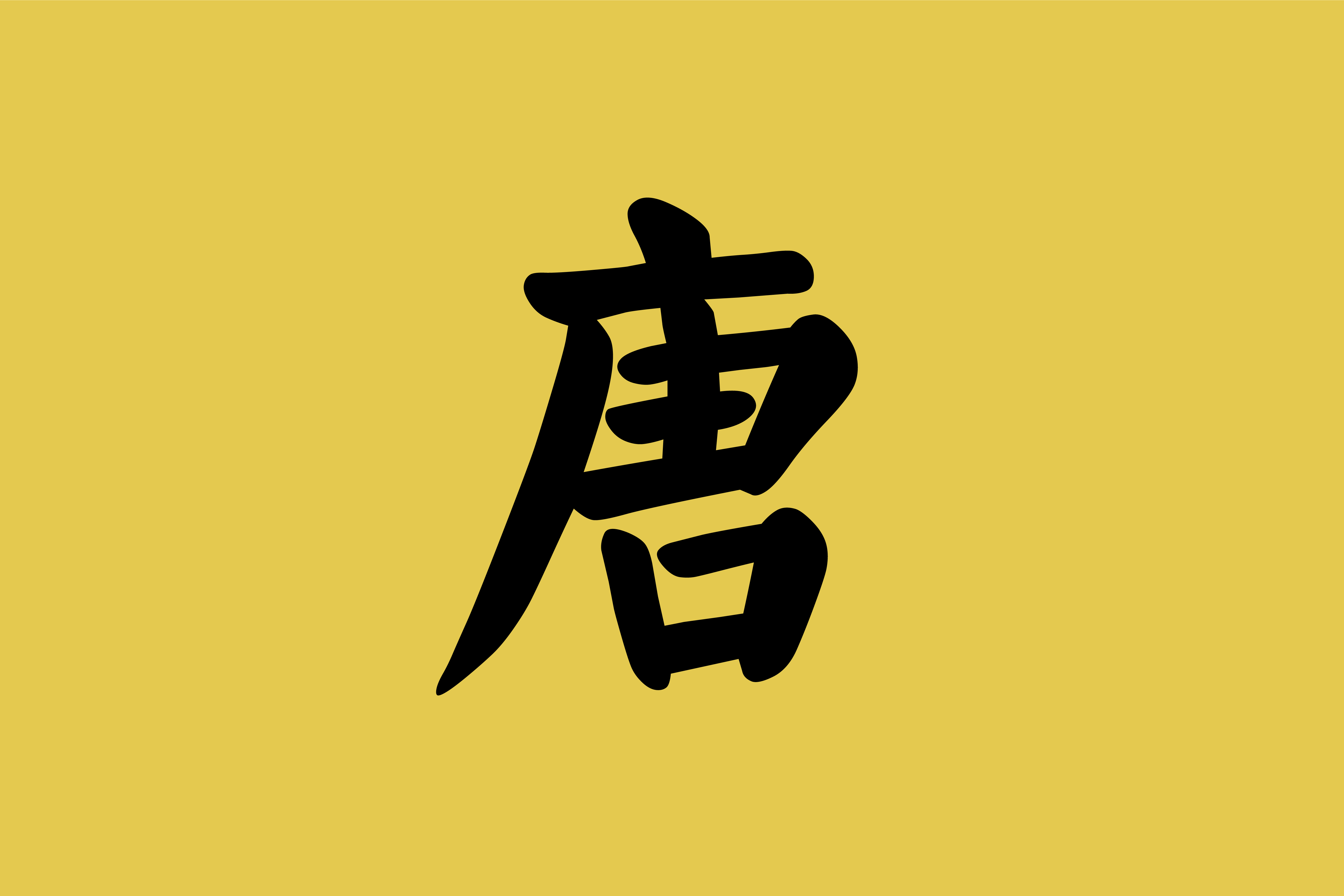 中文（中国大陆）: 自制唐朝虚拟旗帜，用于需要图片识别的情况下